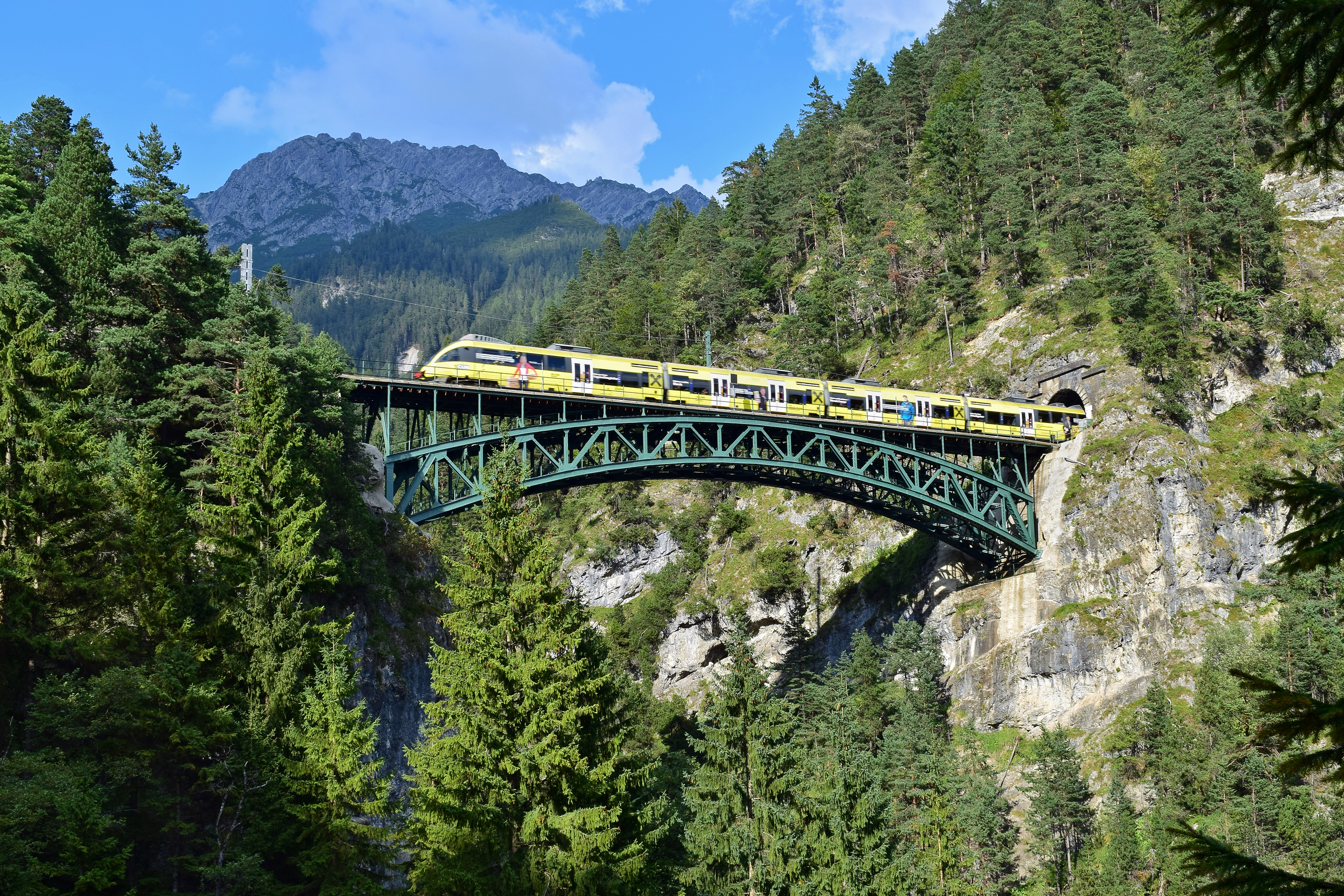 Die Schlossbachgrabenbrücke der Mittenwaldbahn mit dem Schlossbachtunnelportal und S5 Richtung Scharnitz